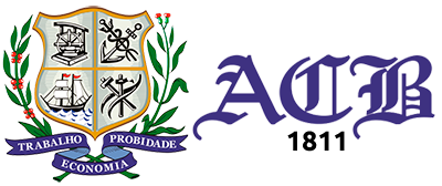 Brasão da Associação Comercial da Bahia e as siglas da instituição.